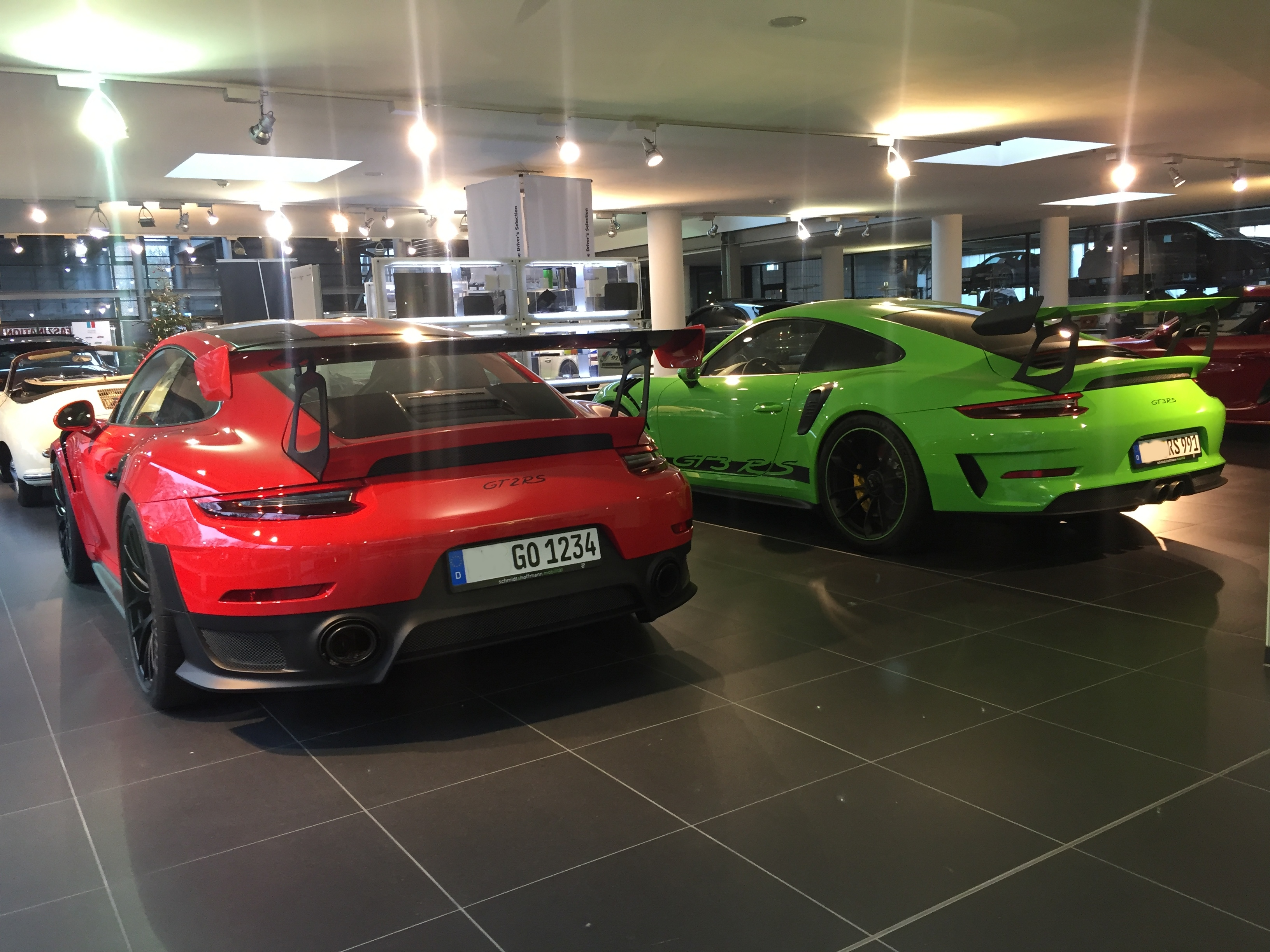 Porsche 991 GT2 RS & GT3 RS Heckansicht